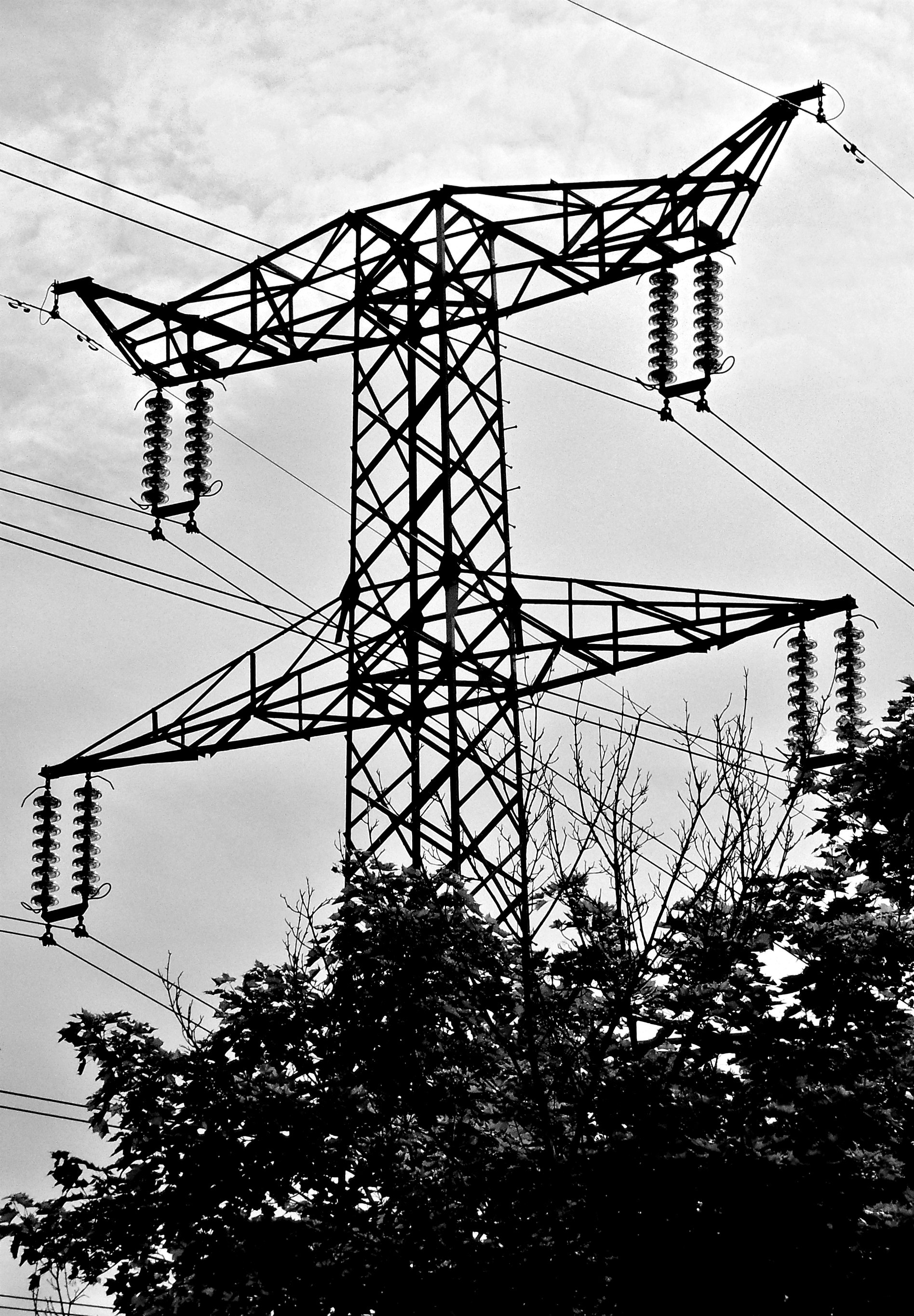 Átviteli hálózat, Budapest